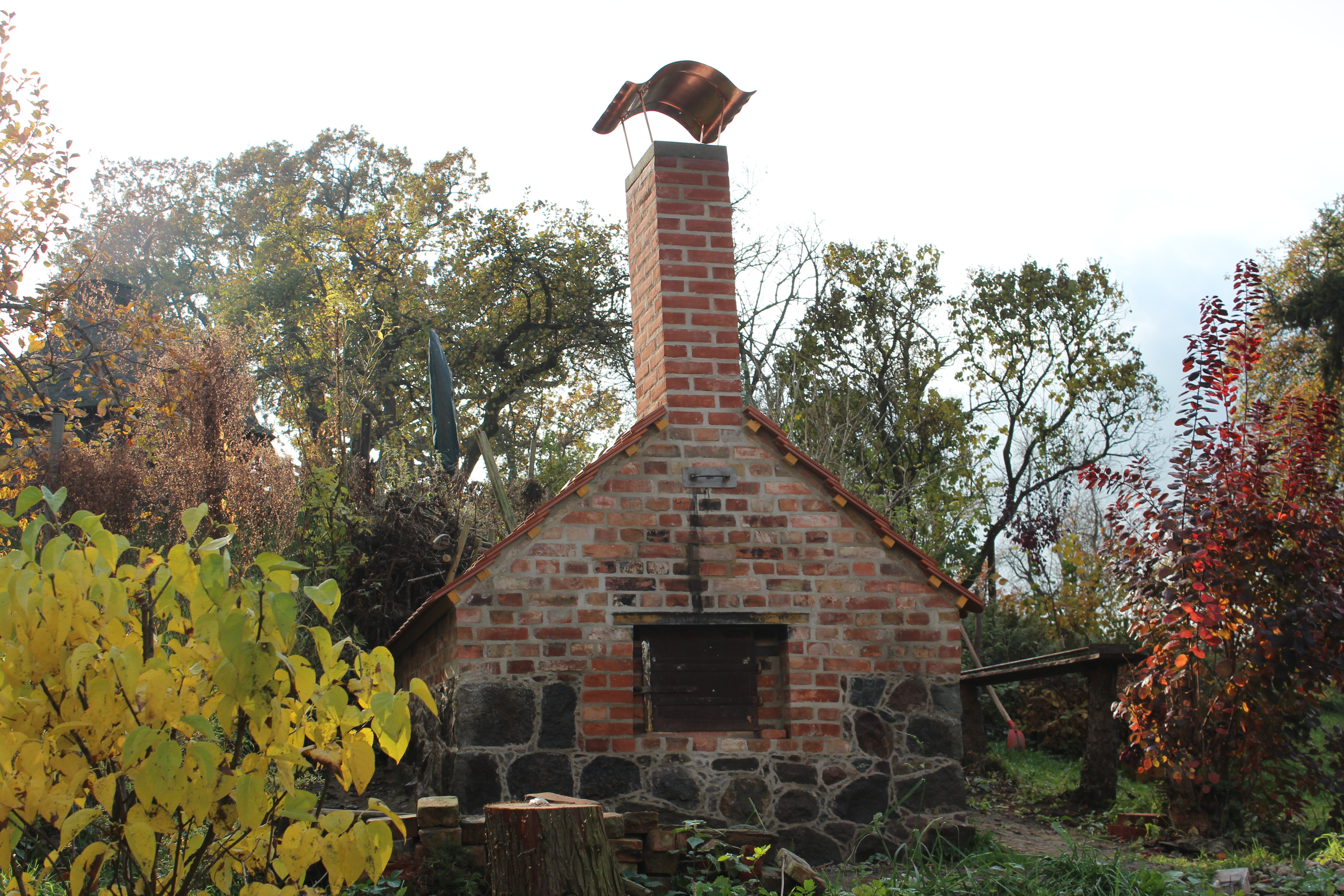 restauriertes Backhaus 2013, gebaut Mitte 19. Jahrhundert